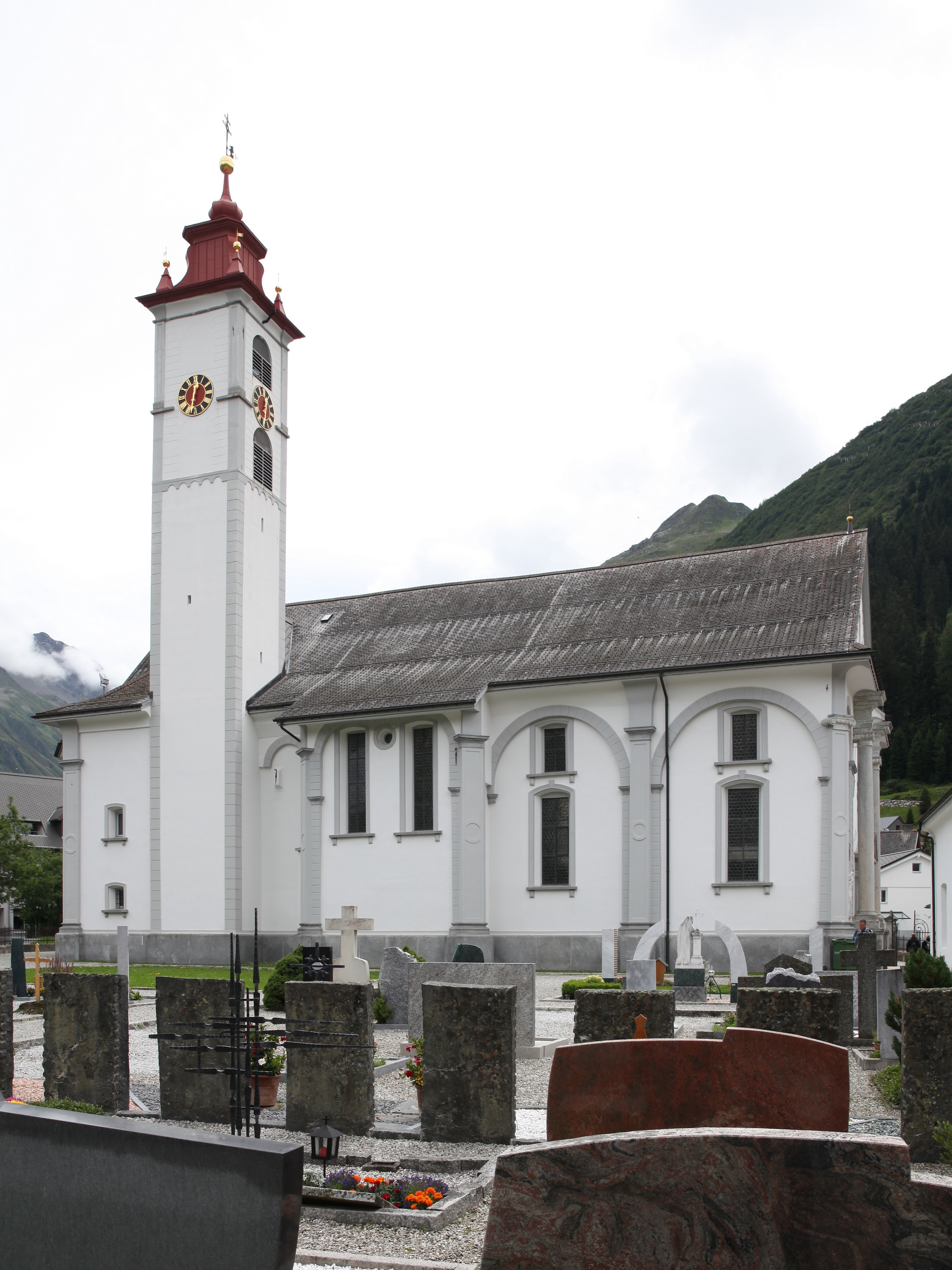 Andermatt, Katholische Pfarrkirche St. Peter und Paul